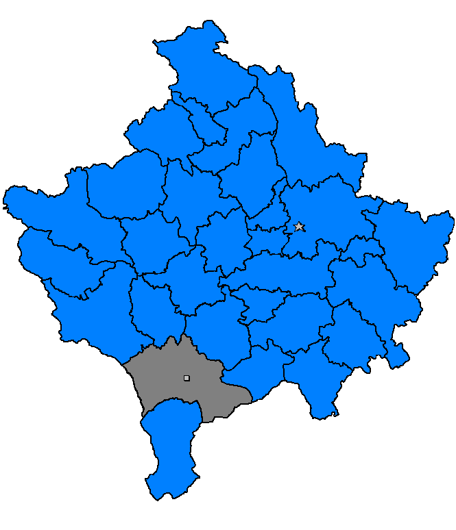 Prizren, Kosovë 2006